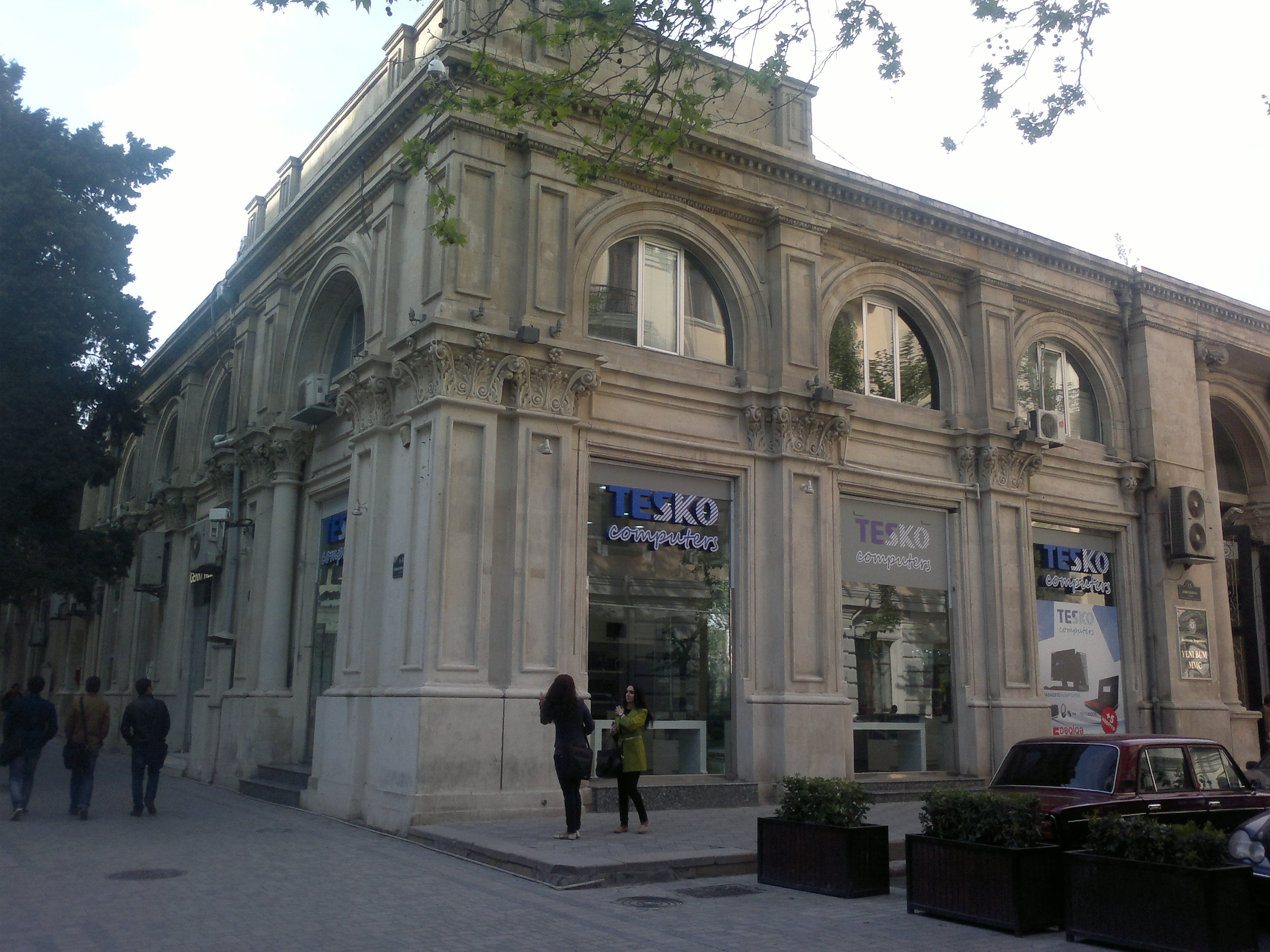 Building on 6 Mammad Amin Rasulzade Street. Built in 1896 by Kazimir Skurevich.